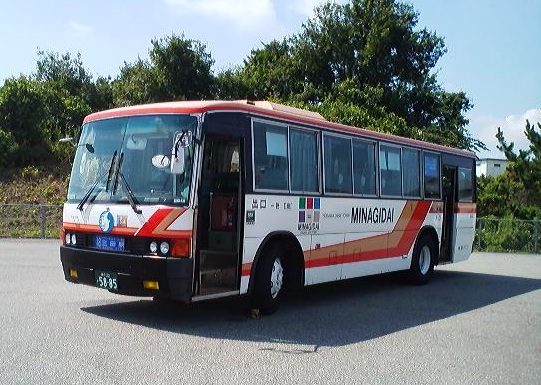 神姫ワンロマ車（高速色） 美奈木台のりばにて